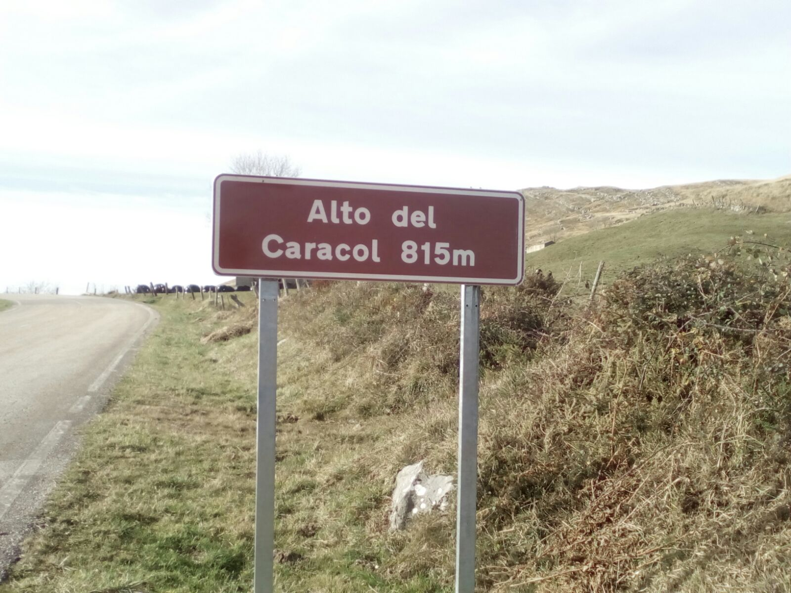 Cartel de carretera del Alto del Caracol en Cantabria (España).